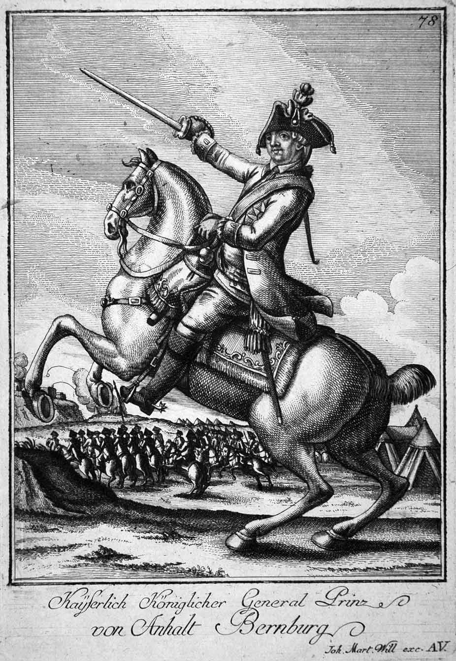 1 grafiskt blad, kopparstick Kopparstick föreställande OKÄND. Konstnär: Joh. Mart. Will